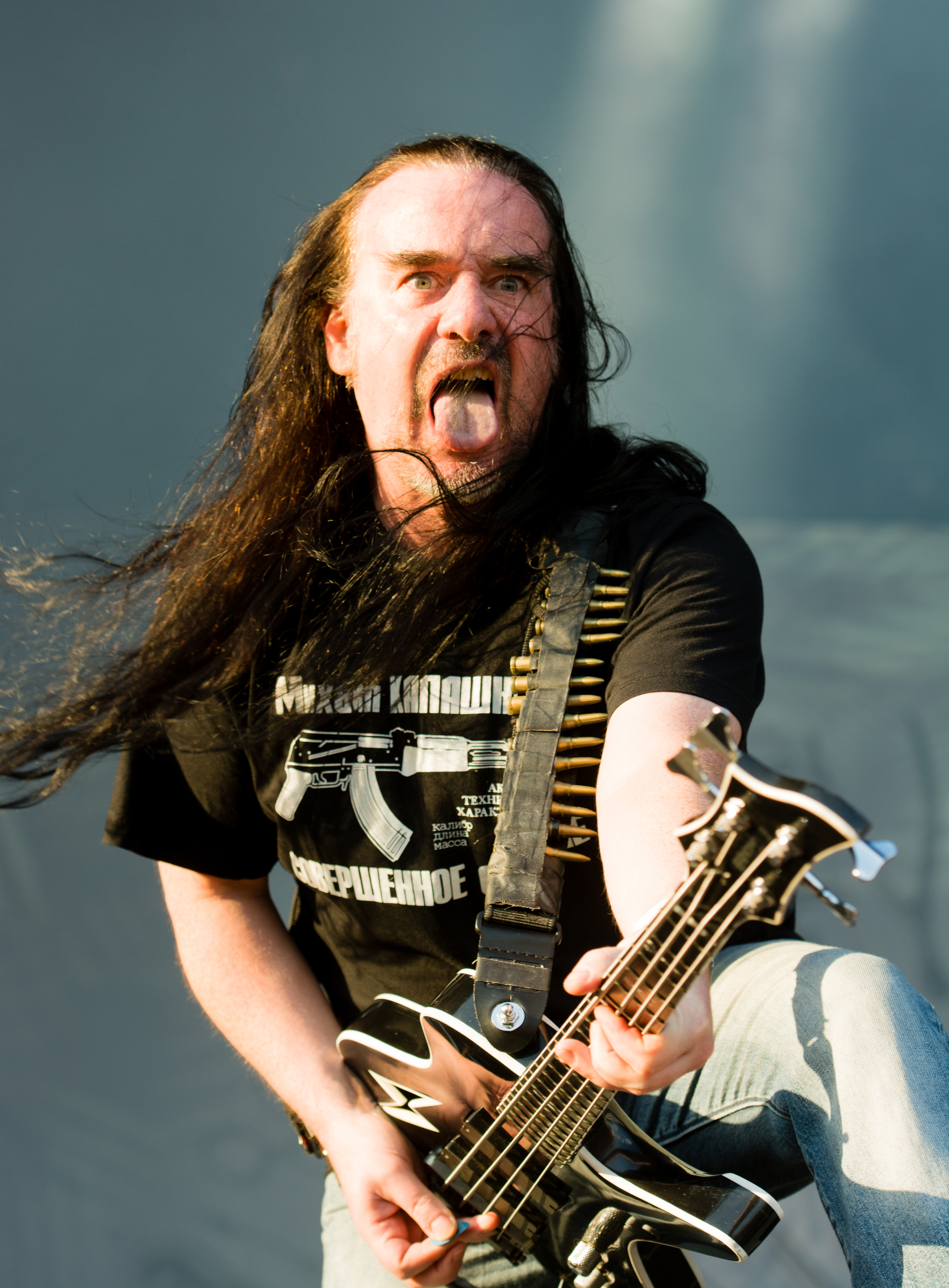 Carcass auf dem Elbriot 2016